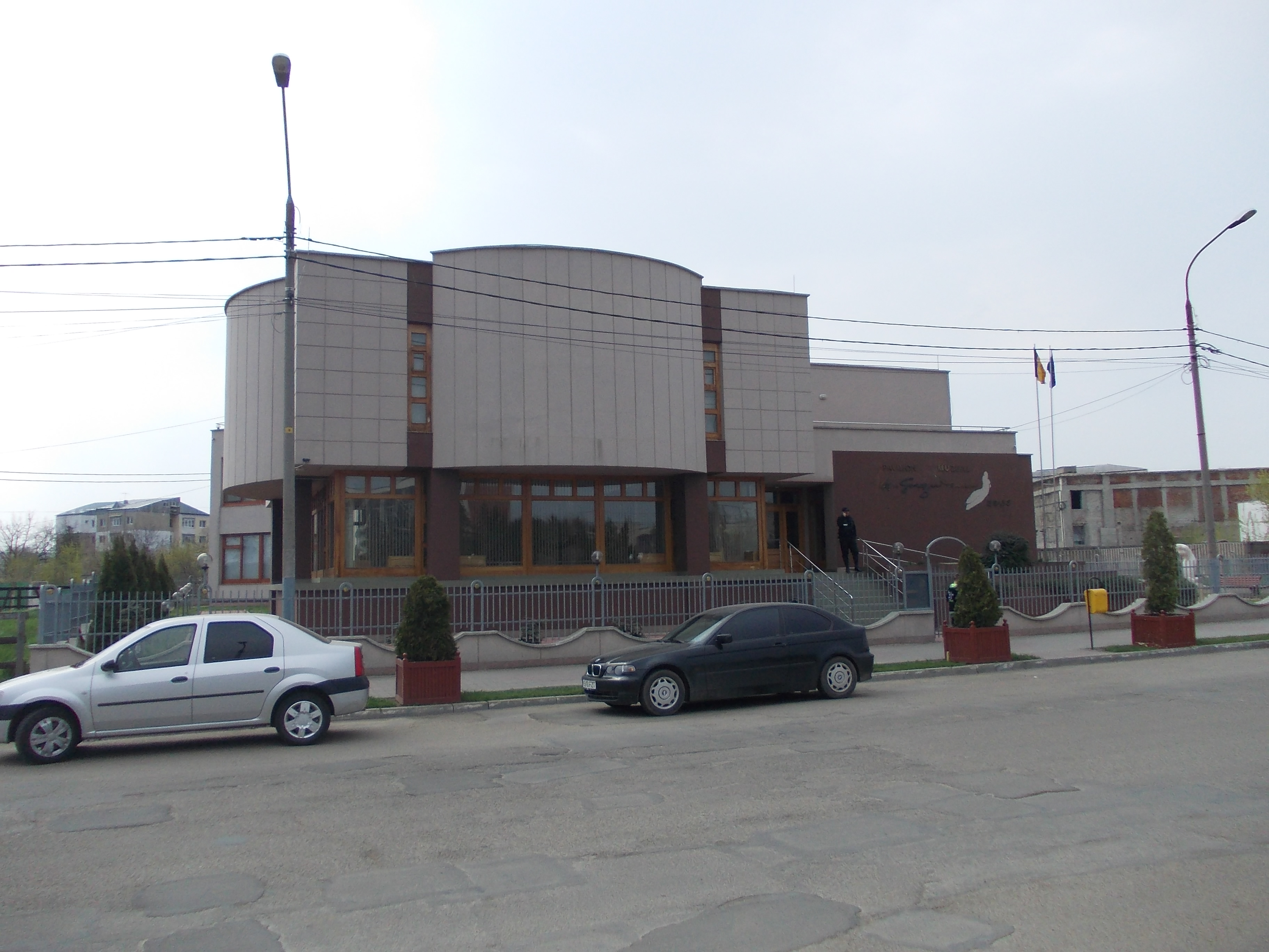 Pavilionul expoziţional Guguianu Bârlad